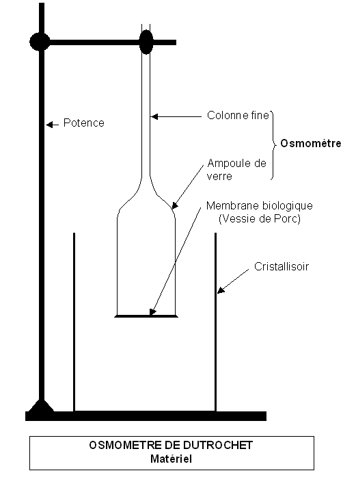 Osmomètre, matériel, support, verrerie, membrane, appareil de mesure